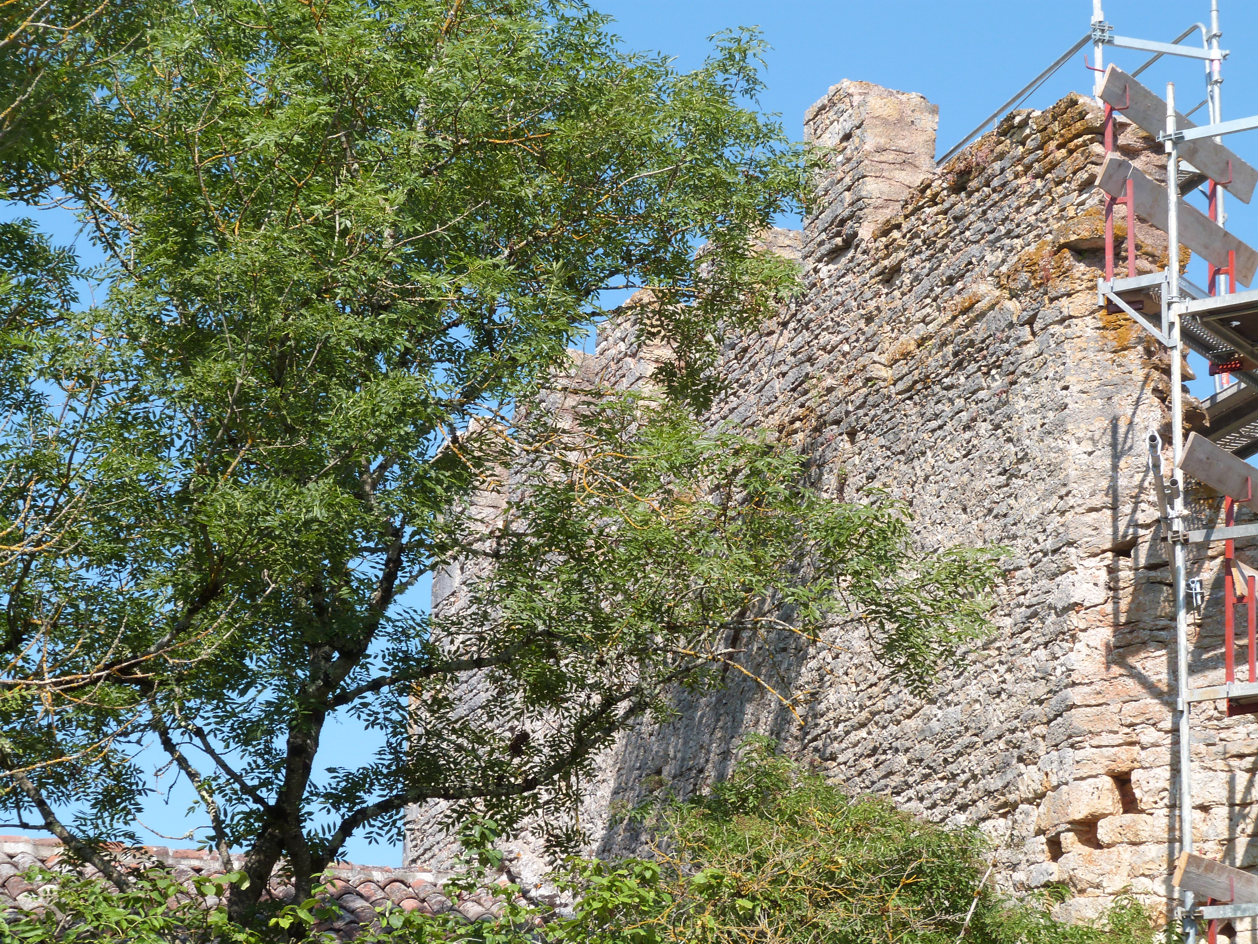 Créneaux d'Aujols